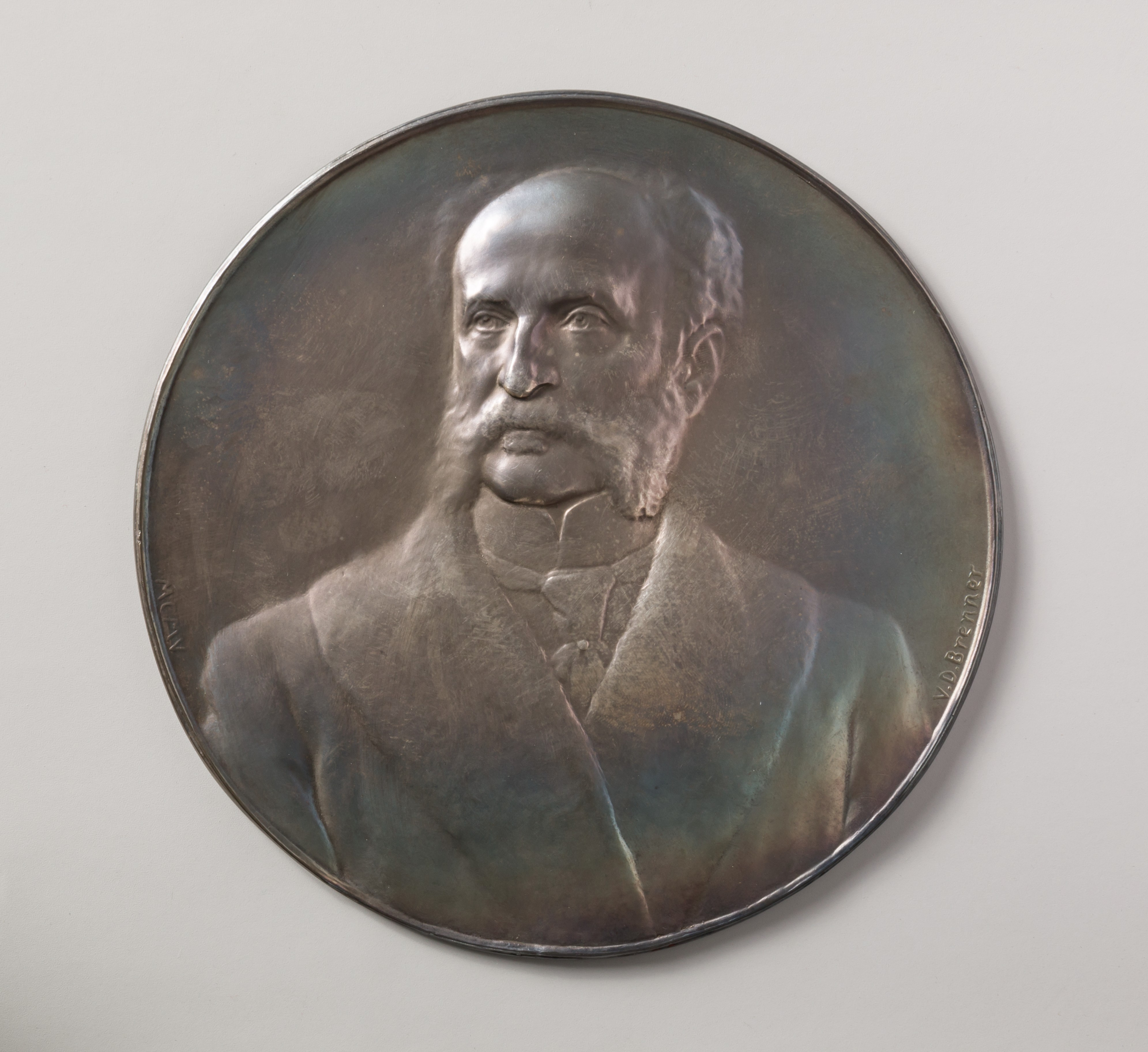 Medal; Sculpture